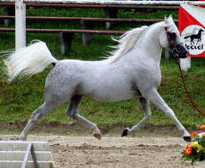 Araber im typischen Schautrab